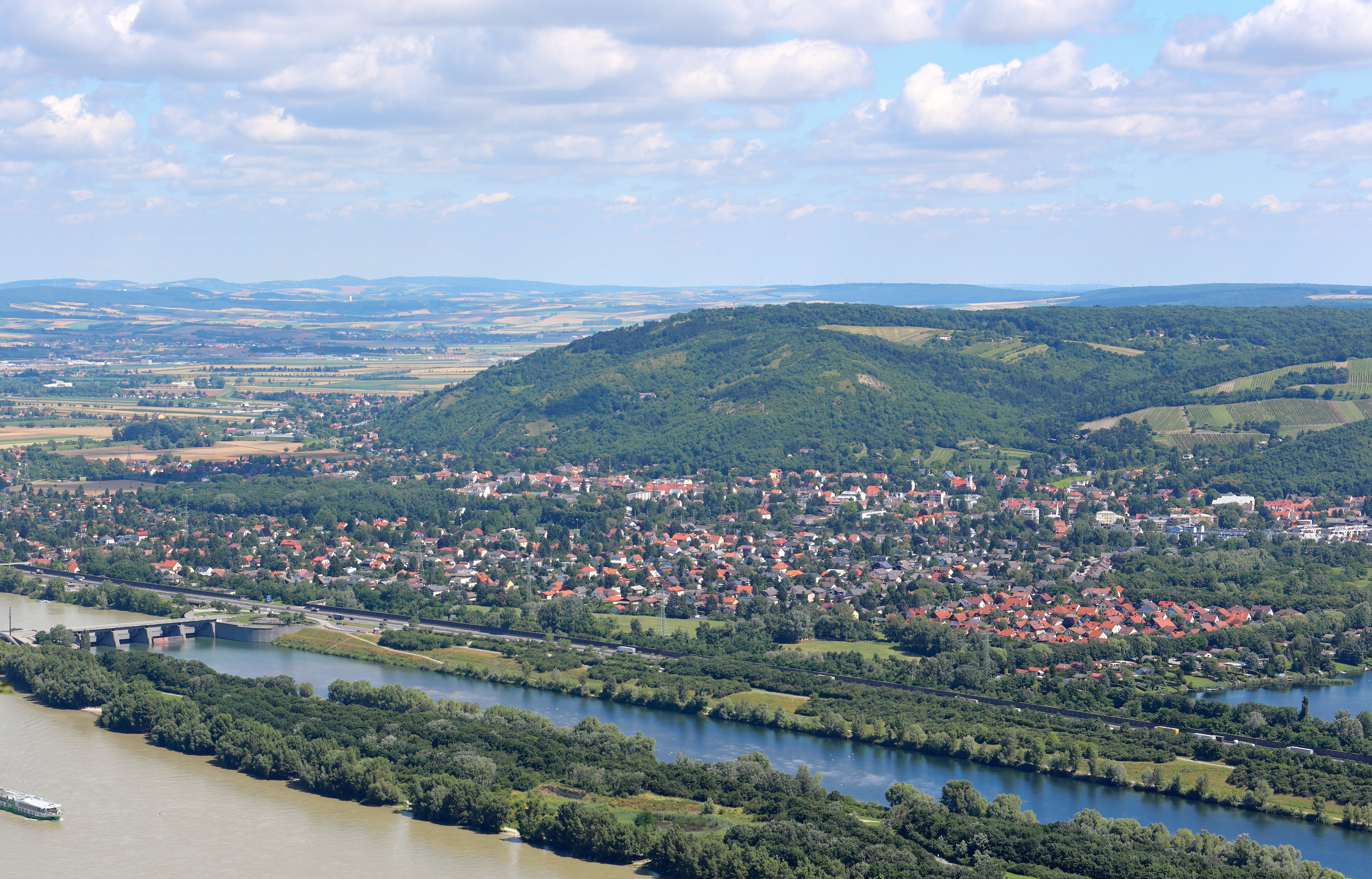 Südwestansicht der niederösterreichischen Marktgemeinde Langenzersdorf. Von vorne nach hinten: Die Donau, die Donauinsel, das Entlastungsgerinne Neue Donau mit dem Einlaufwerk (ganz links), die Donauufer-Autobahn (A22), die Marktgemeinde Langenzersdorf und der 385 Meter hohe Bisamberg.